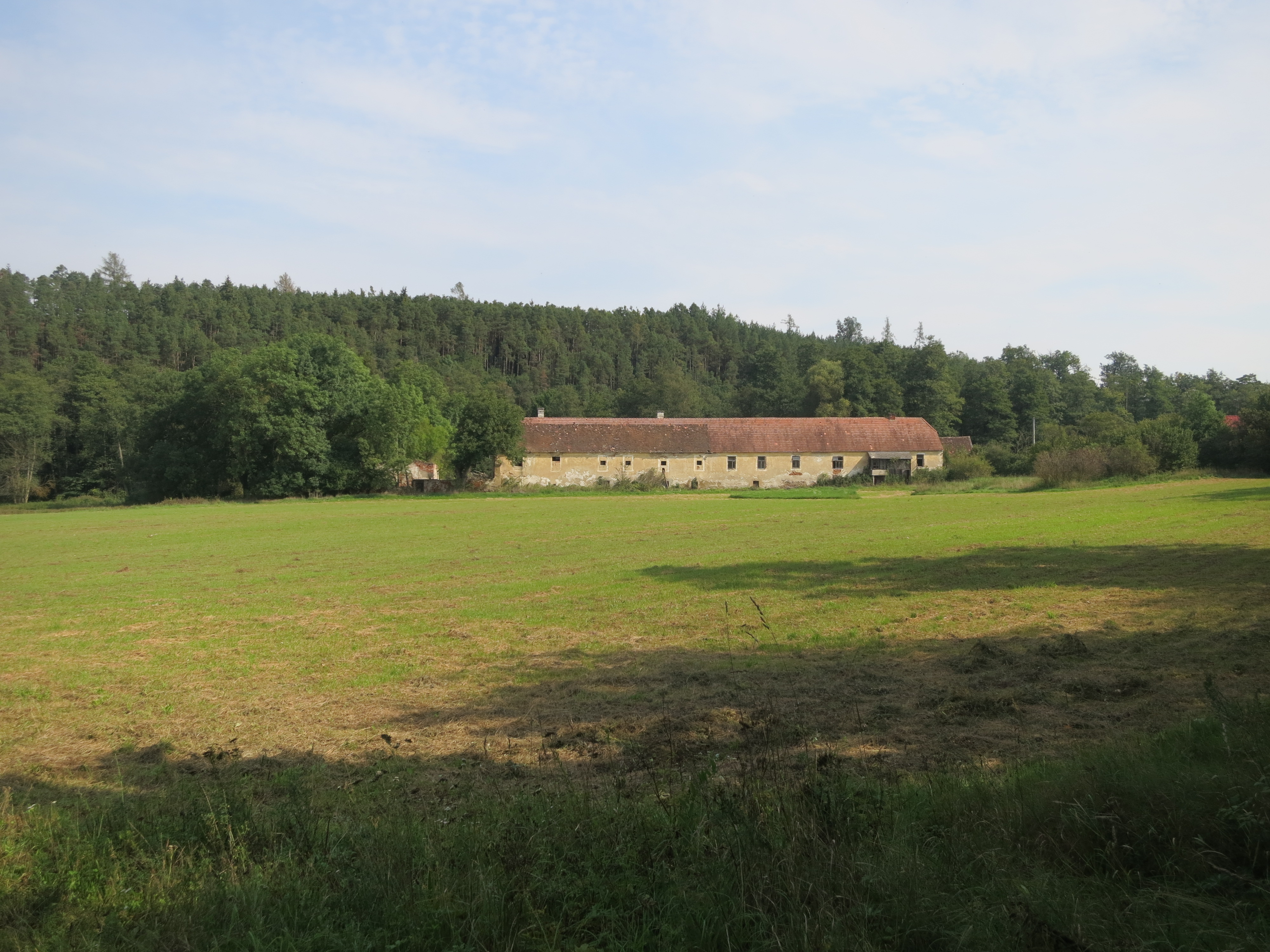 Budova bývalé sladovny dvora Alinkova v pohledu od jihu.